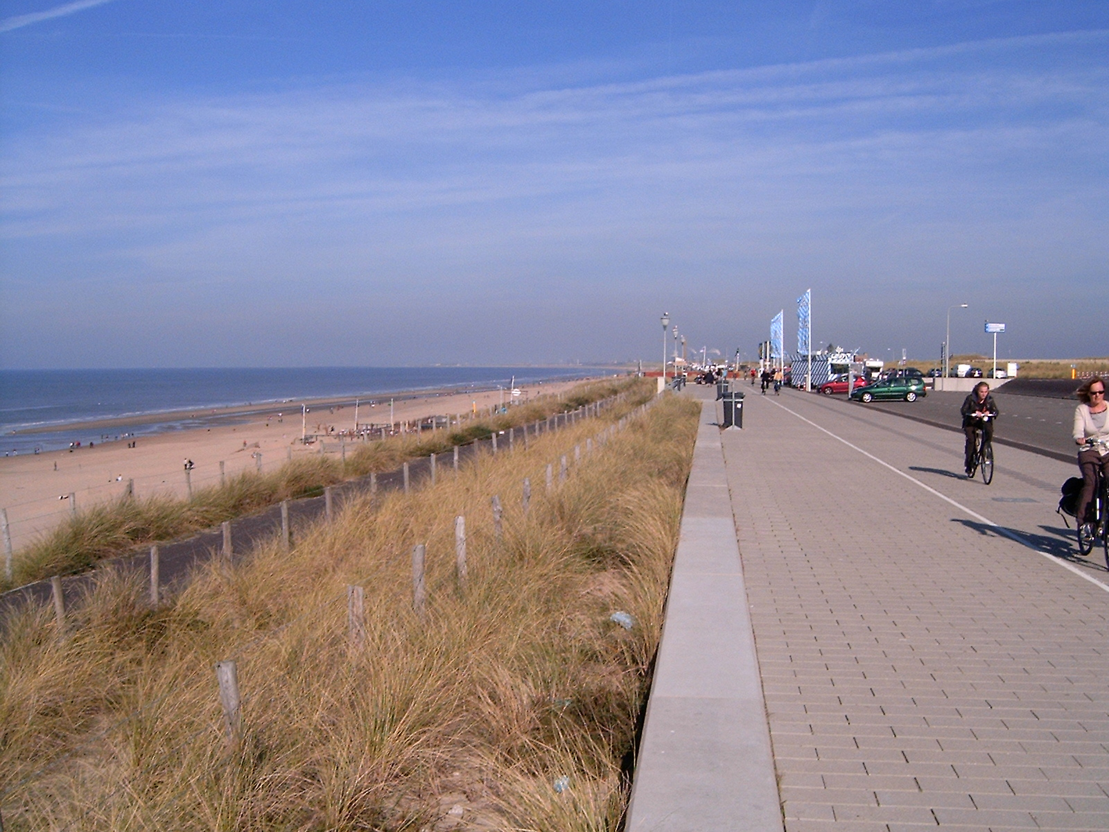 Zicht op de Boulevard van Zandvoort